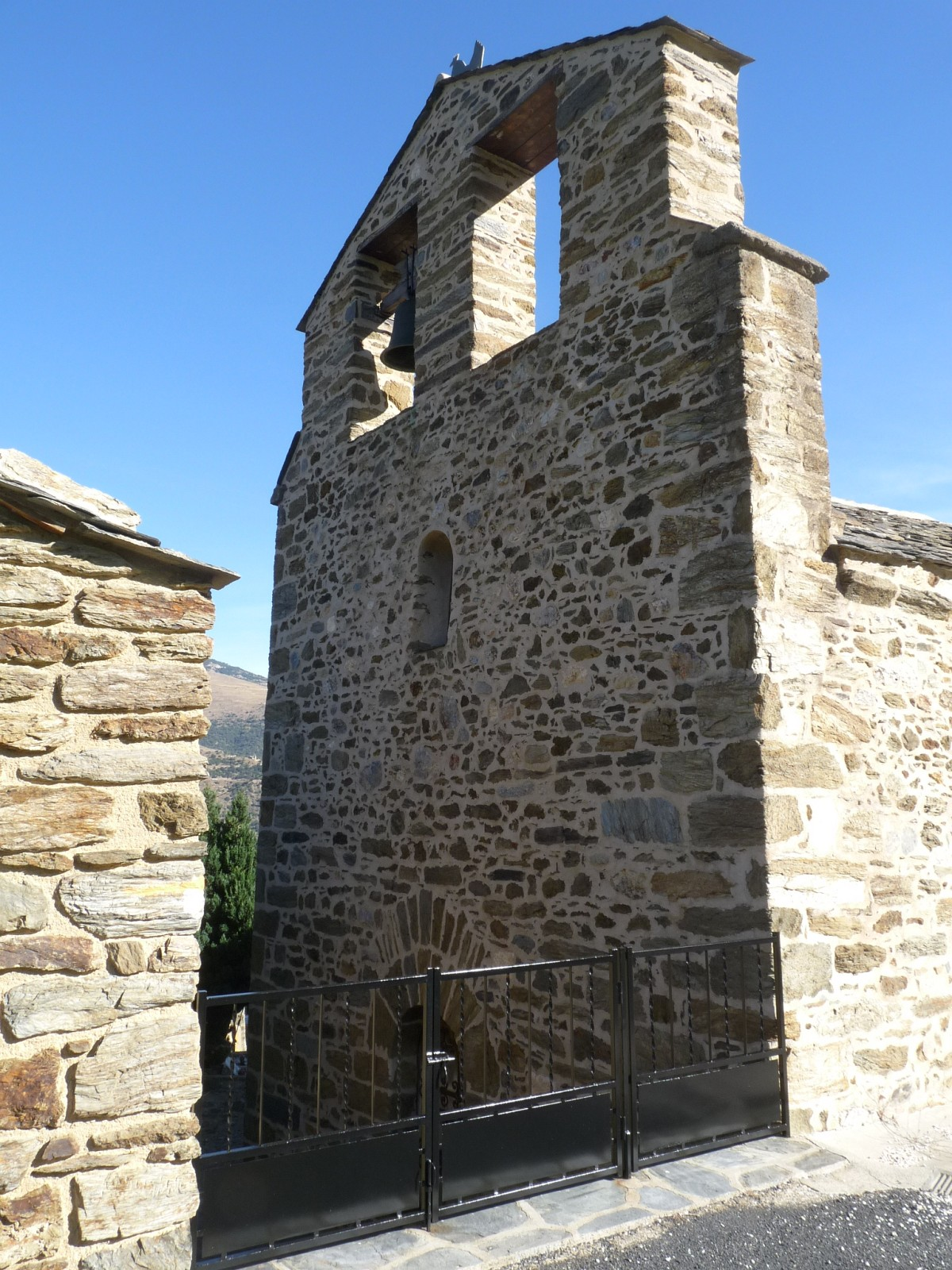 Eglise de Souanyas, Pyrénées-Orientales, France